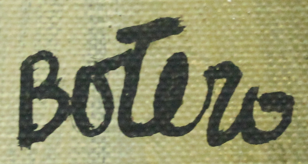 Signatur von Botero